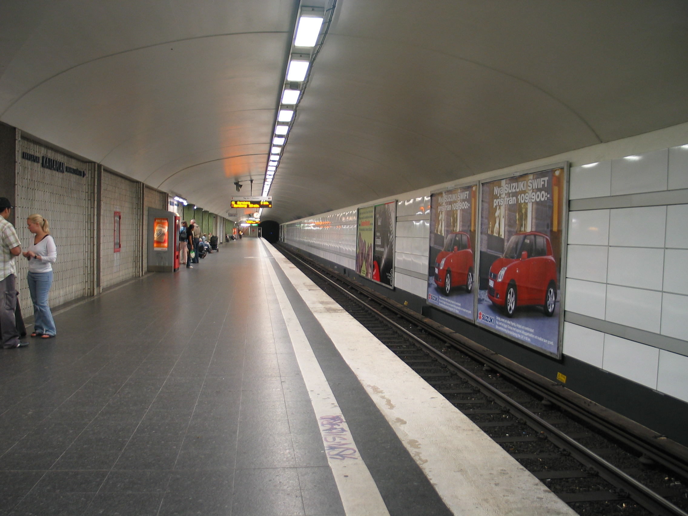 Karlaplan, a metro station in Stockholm, Sweden.